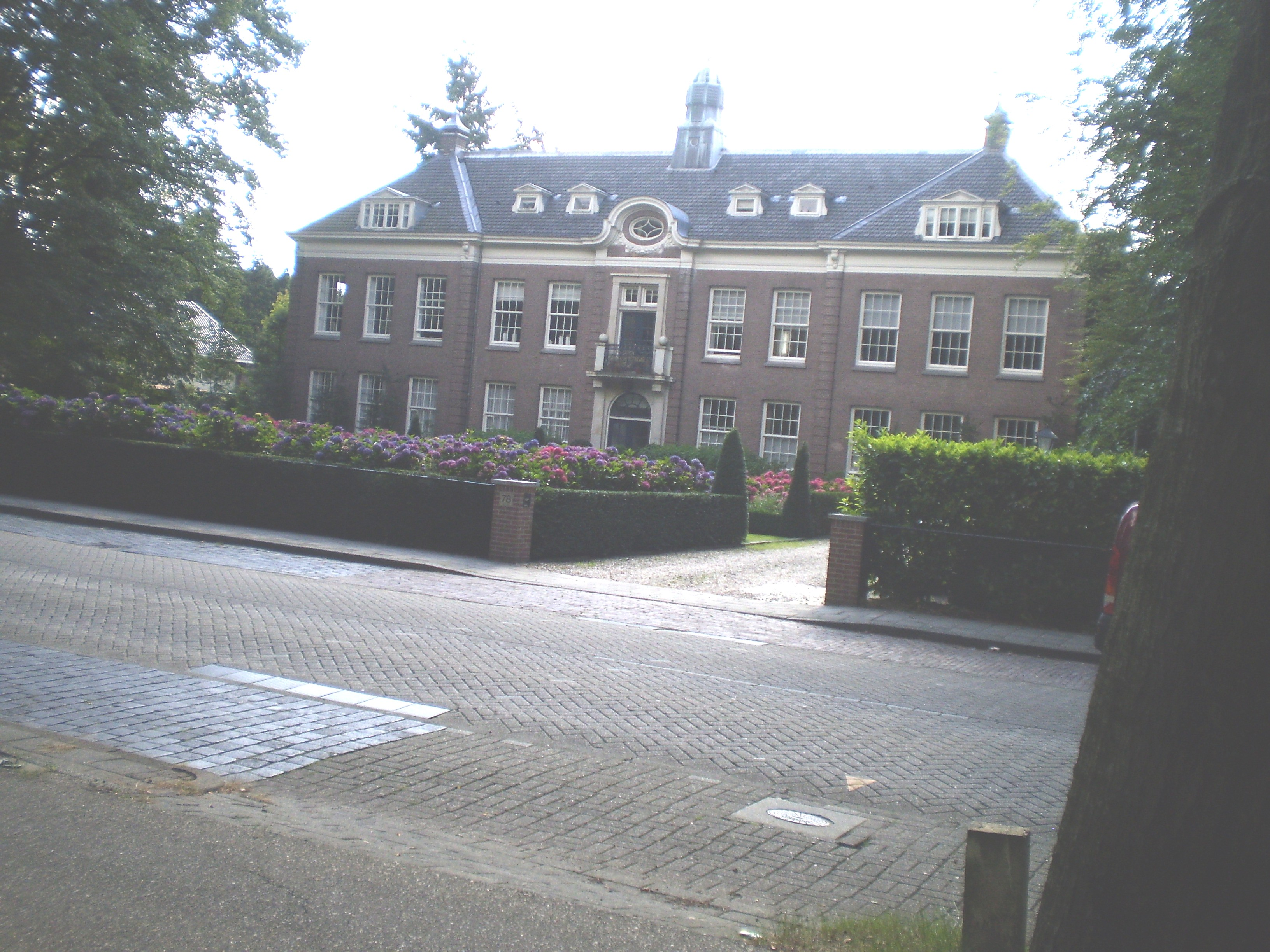 Blindeninstituut, Huis ter Heide